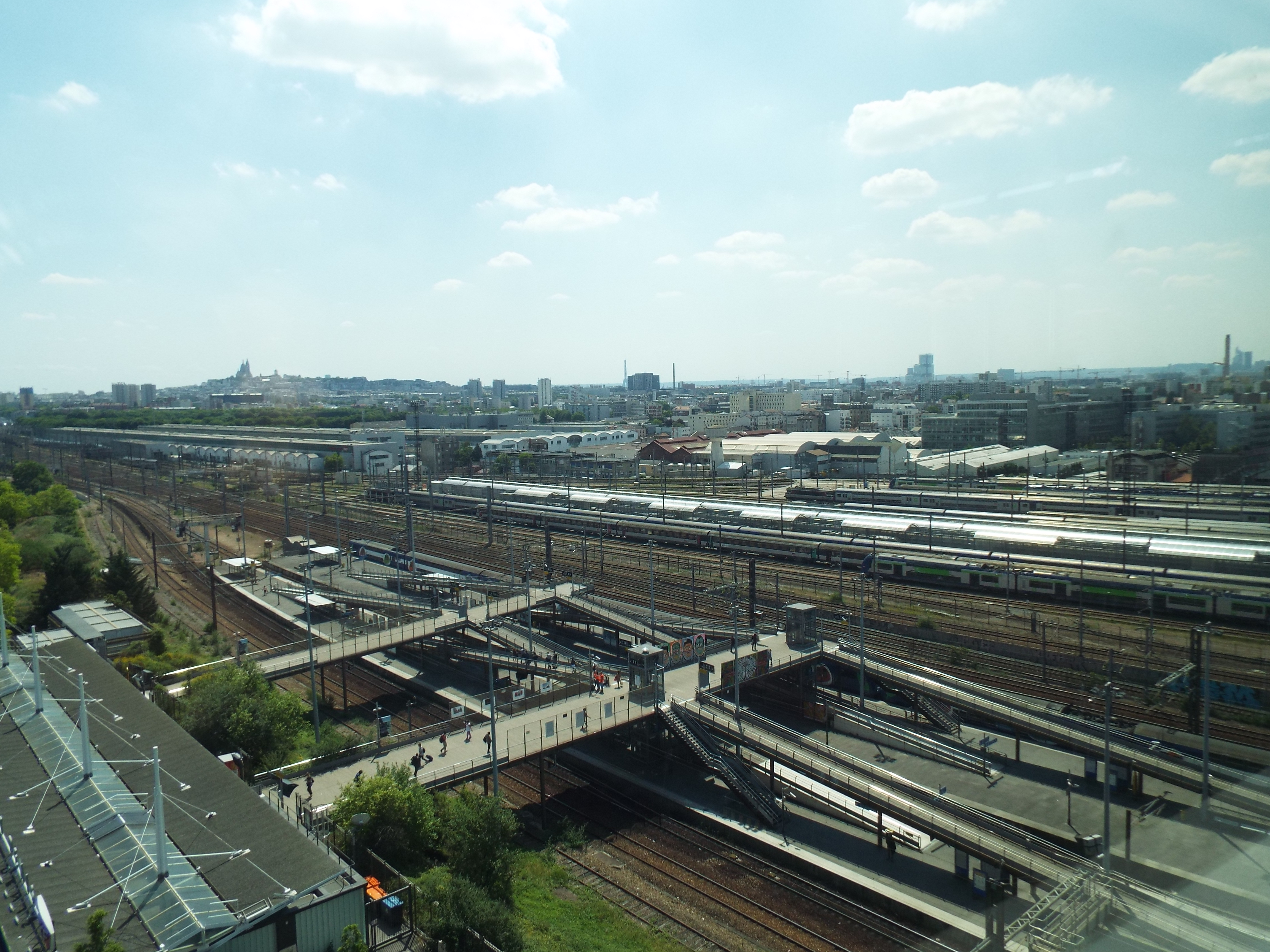 Le Technicentre du Landy et la gare du Stade de France - Saint-Denis, vus depuis le siège de la SNCF, à Saint-Denis, département de la Seine-Saint-Denis, France.